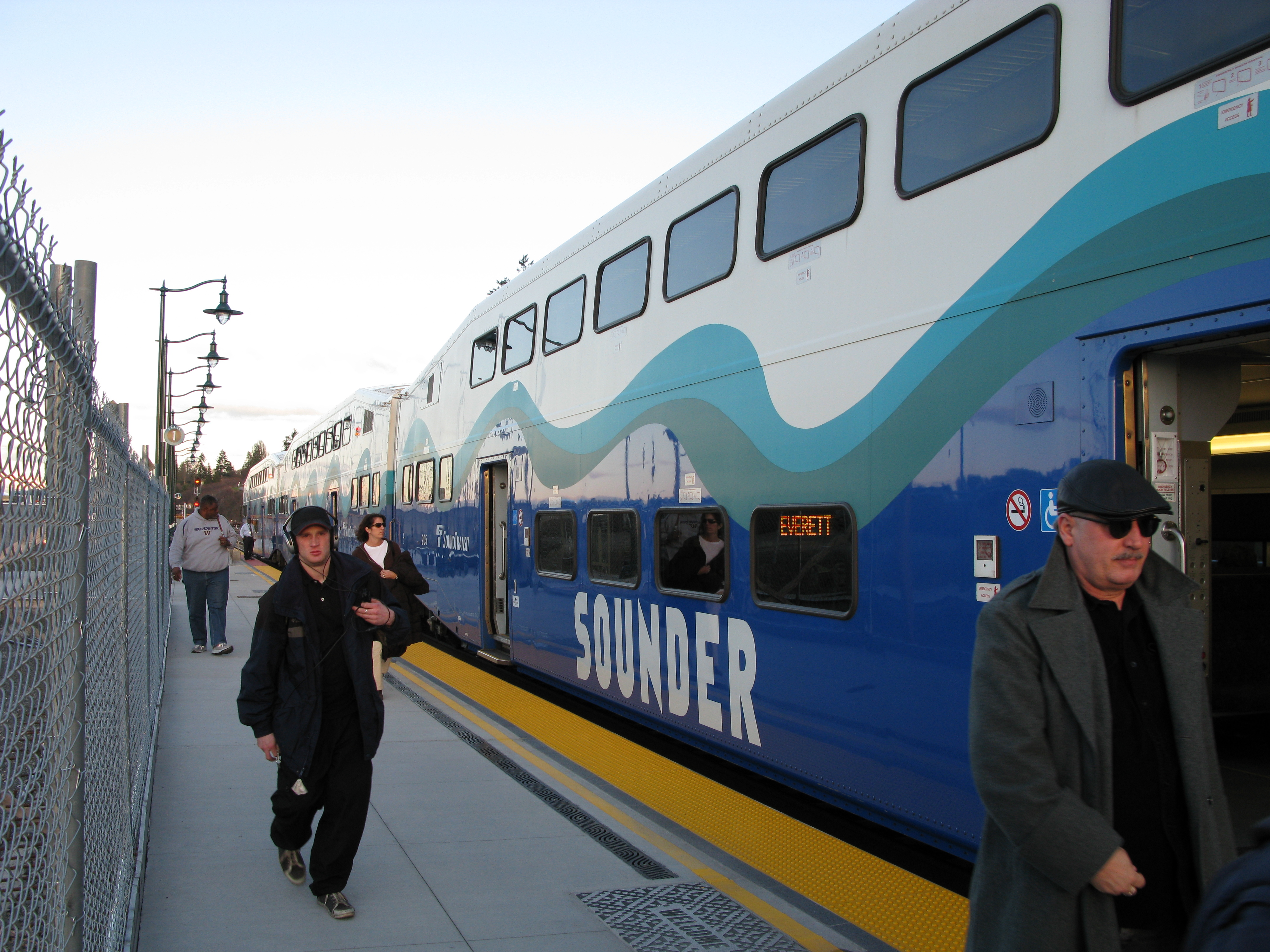 Sounder to Everett